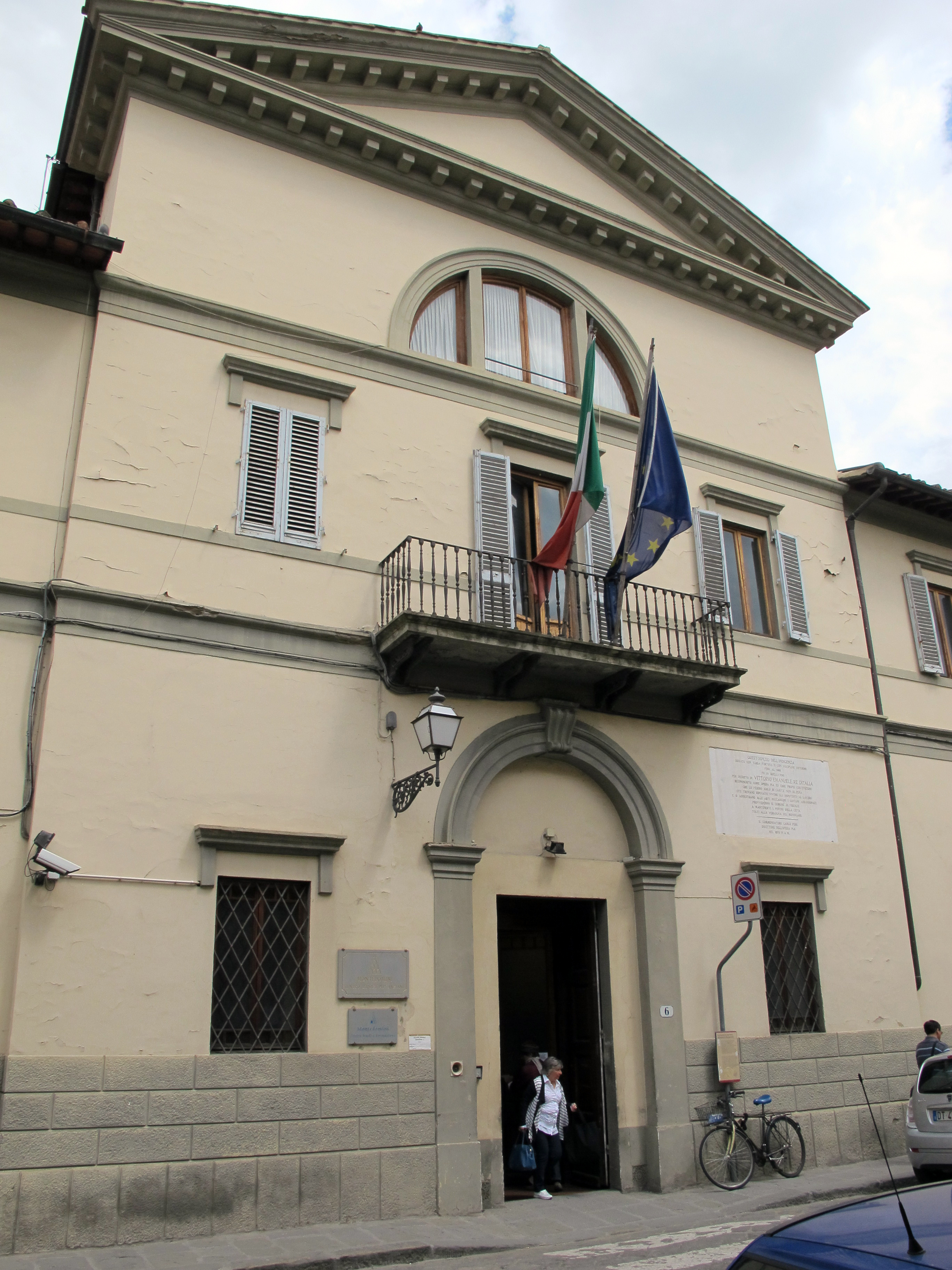 Montedomini, ext.